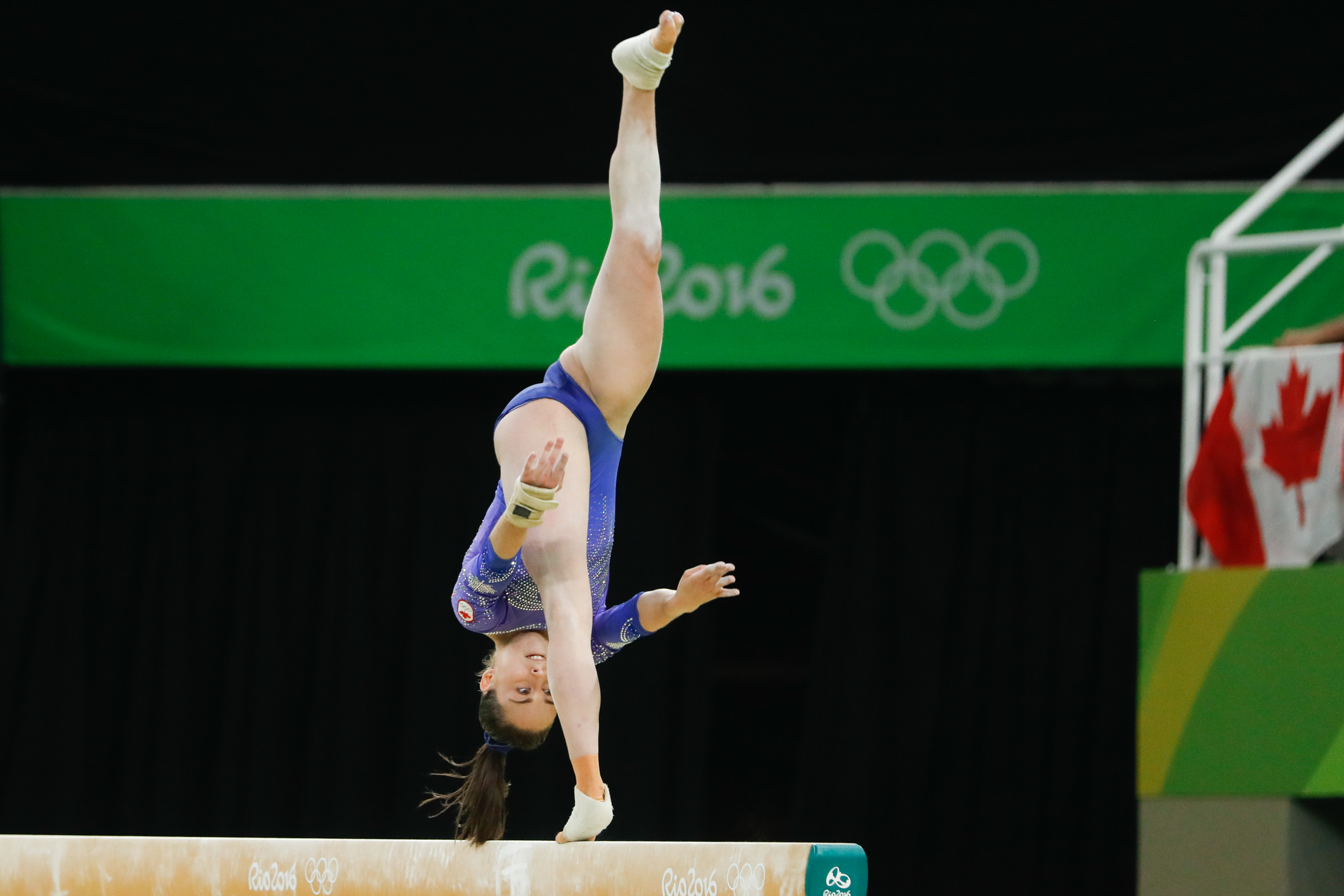 Rio de Janeiro - Ginasta do Canadá Isabela Onyshko termina final da trave na 8ª colocação (Fernando Frazão/Agência Brasil)